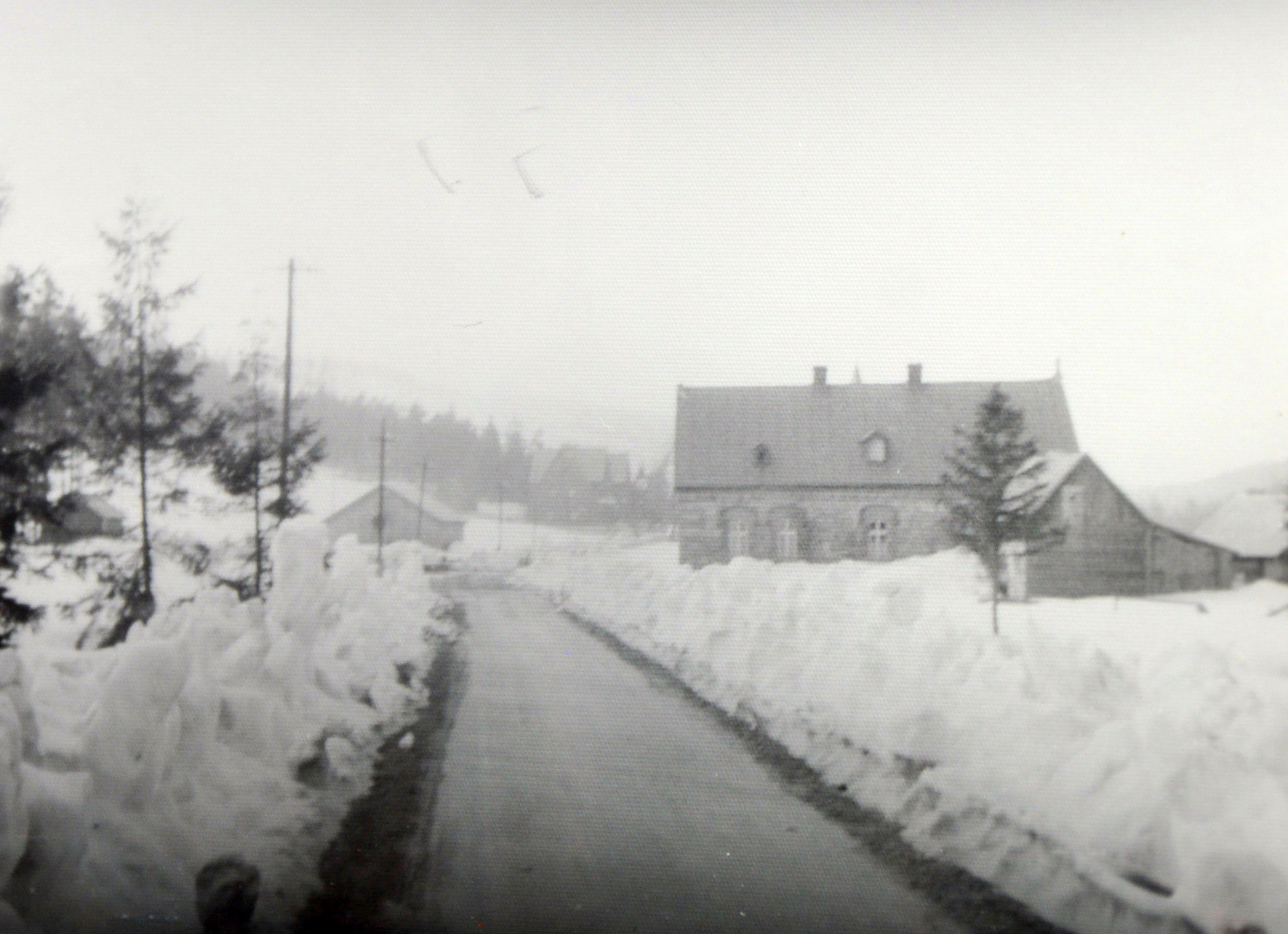 Strażnica Orle, zima 1988